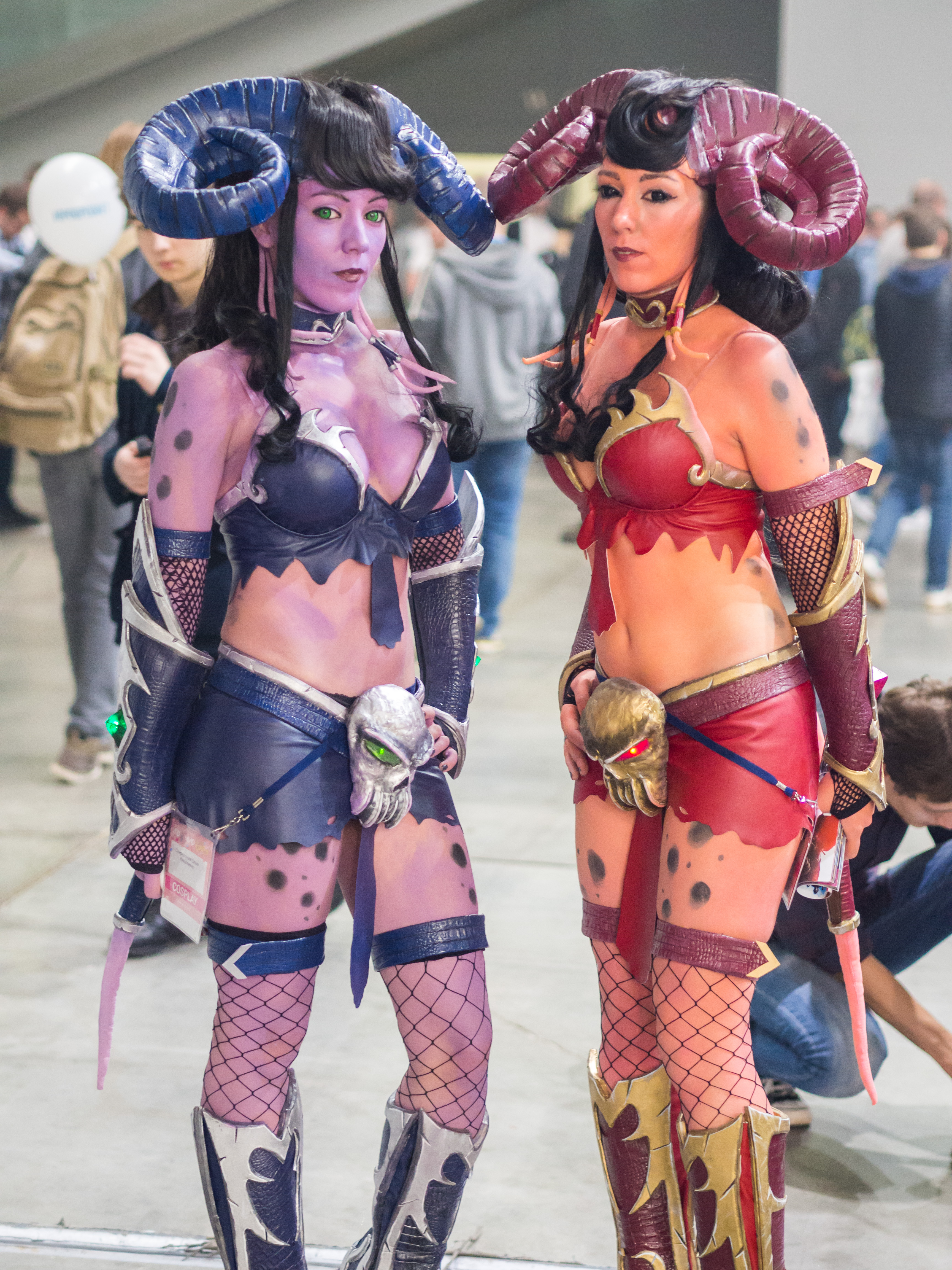 day 3